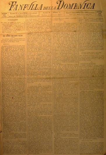 Fanfulla della Domenica, 1880